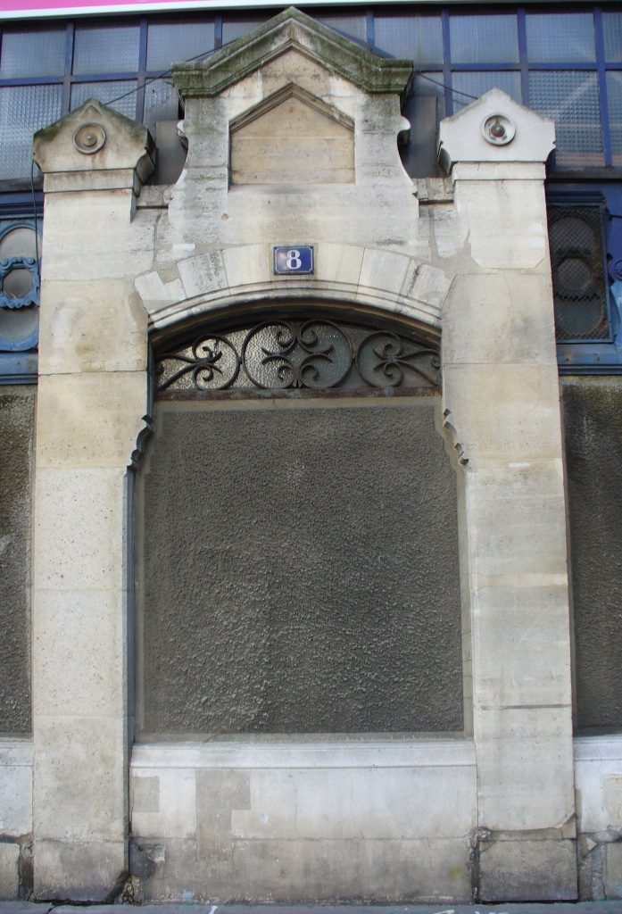 Elément de l'ancienne Rotonde du Temple, Paris III°